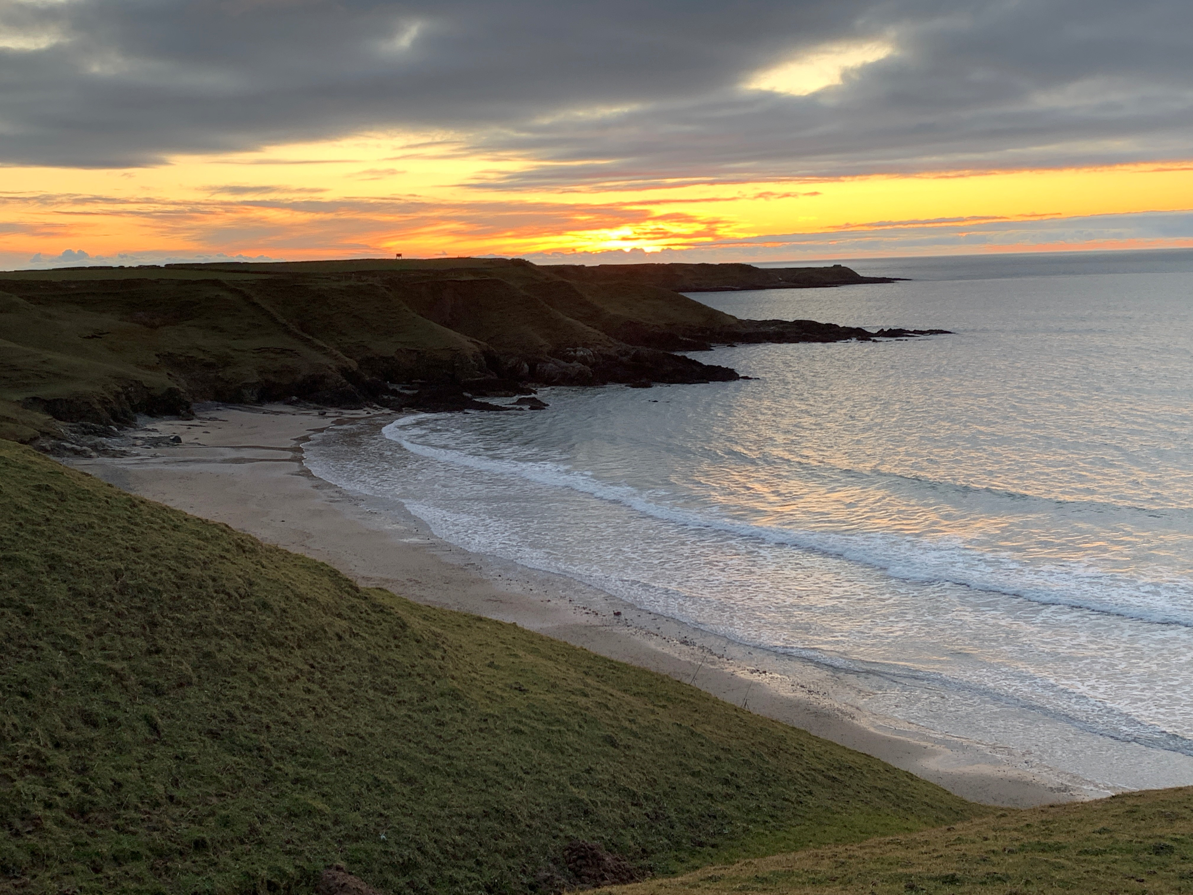 Machlud ar draeth Tywyn, Chwefror 2020.